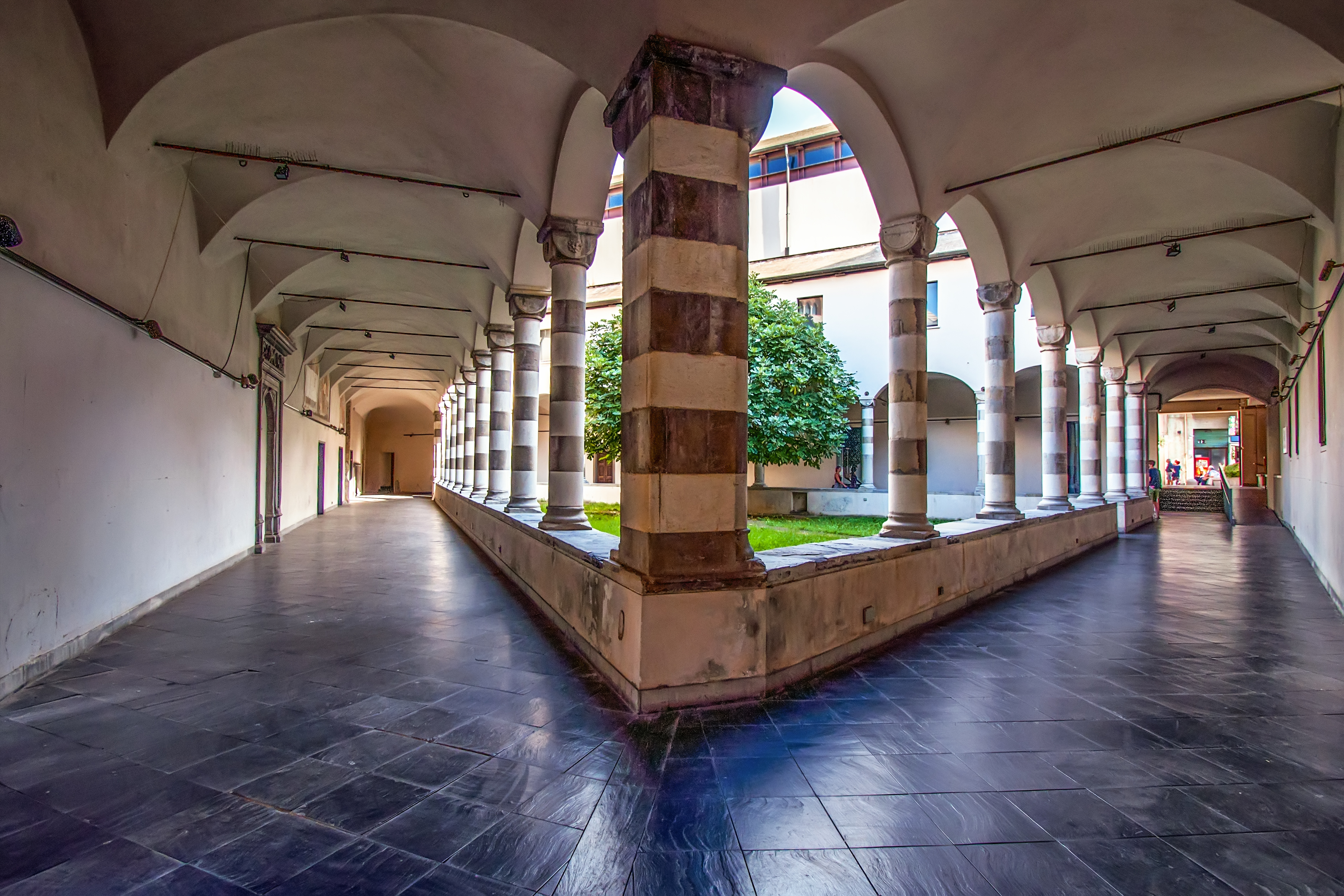 Chiostri e museo di Sant'Agostino This is a photo of a monument which is part of cultural heritage of Italy.